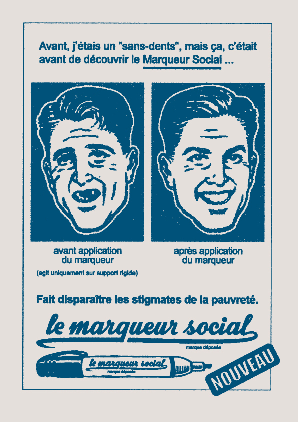 Affiche caricaturant les pauvres, suite à la polémique des sans-dents, expression mise en avant dans le livre de Valérie Trierweiler sur François Hollande